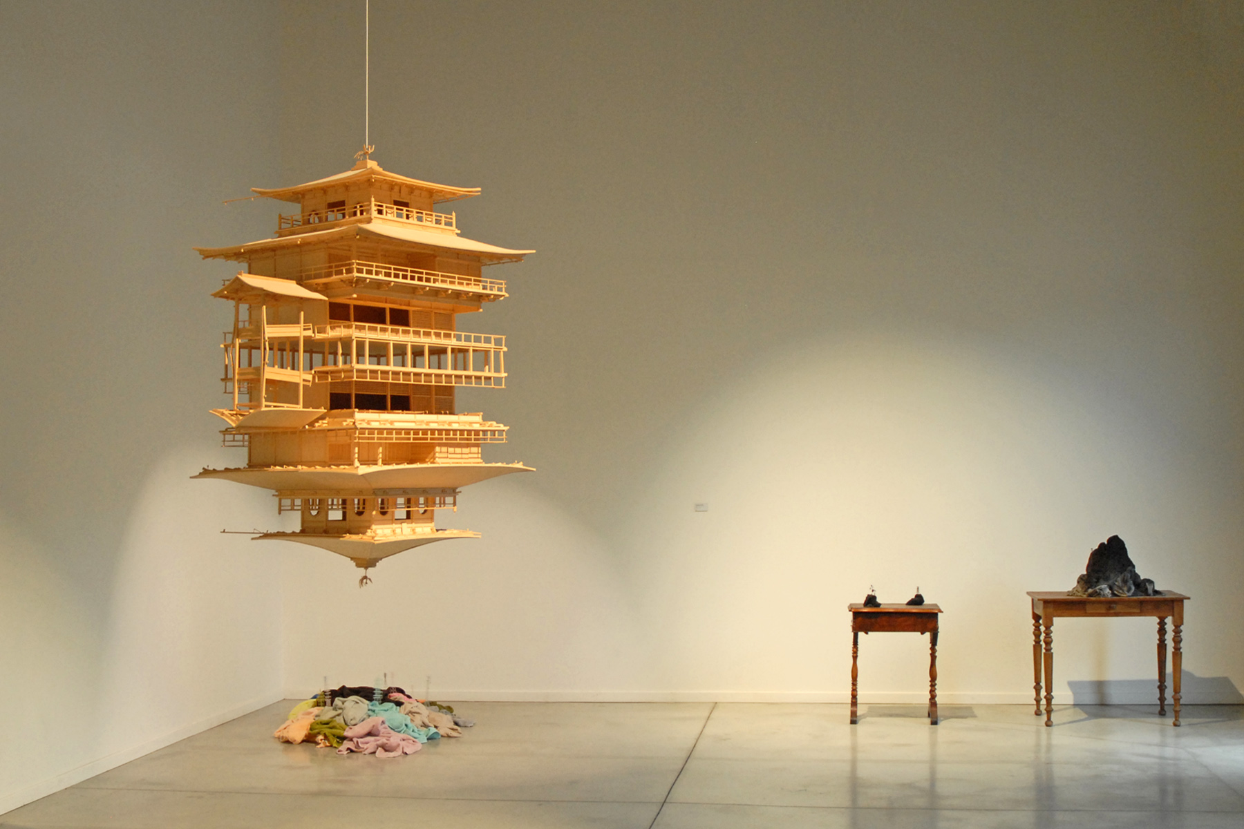 Reflection Model 2001 bois de cyprès japonais, fil (à gauche suspendu) Sculptures 2001-2008 oeuvres de Takahiro Iwasaki (1975, Hiroshima) La Sucrière Xe Biennale de Lyon "Le spectacle du quotidien" Commissaire : Hou Hanru